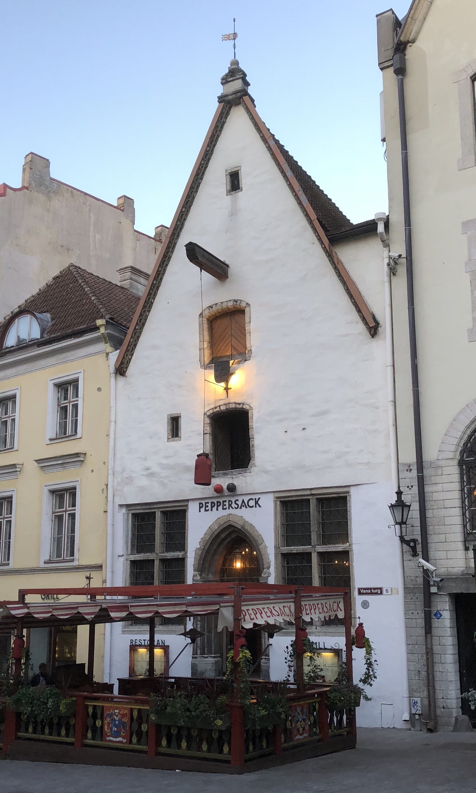 Haus Alter Markt 6